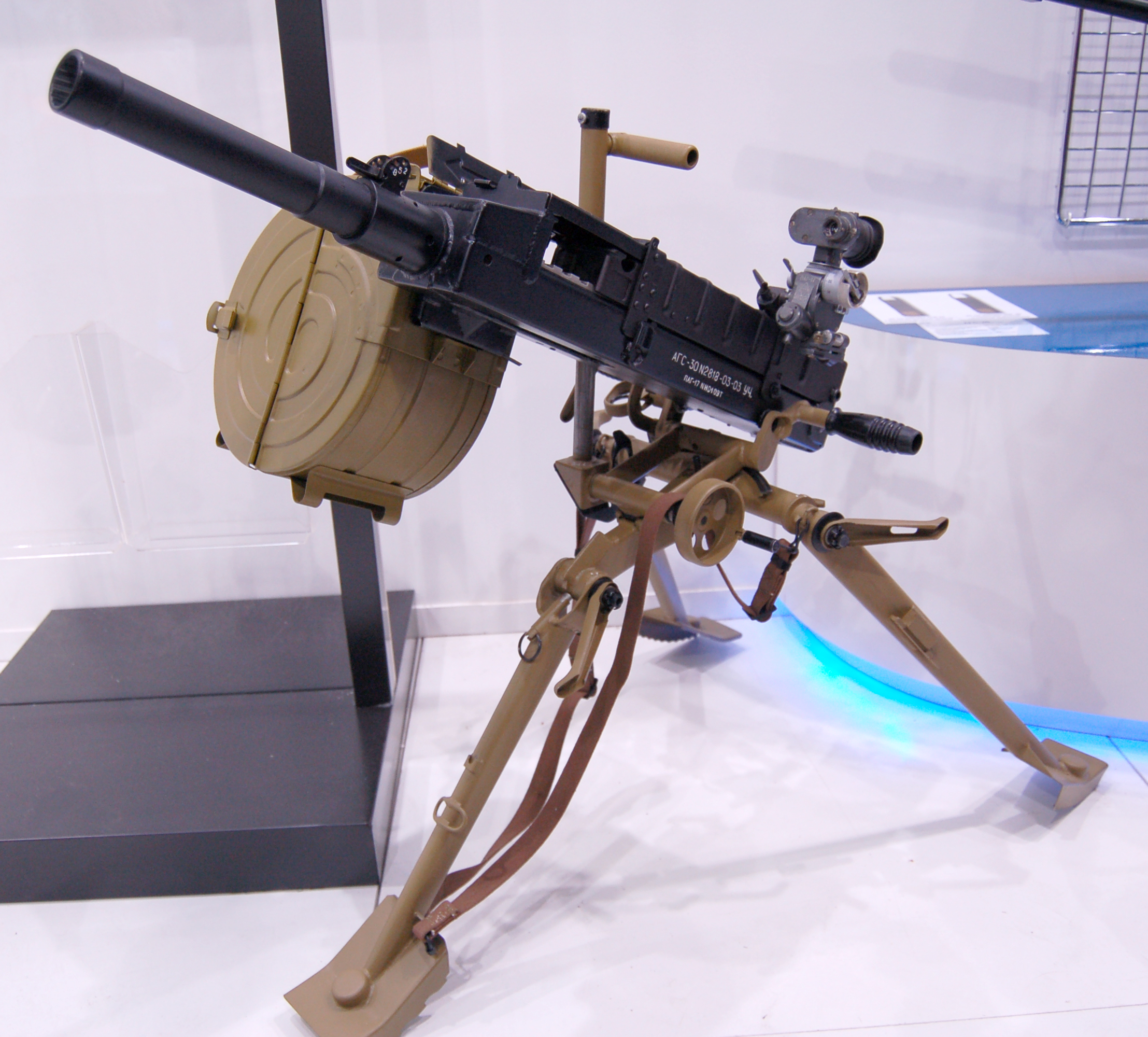 Автоматический гранатомёт АГС-30 на выставке МАКС-2009